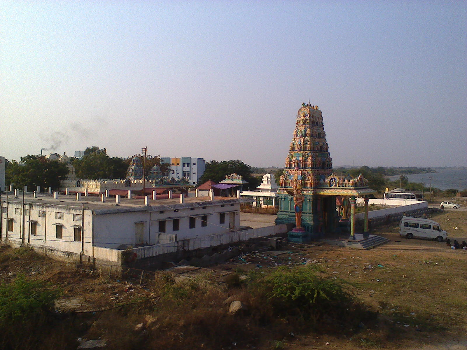 శ్రీసీతారామాలయం,బీచుపల్లి